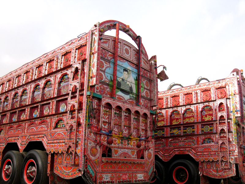 sisters getting ready